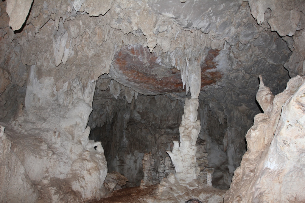 CuevasCandelaria1